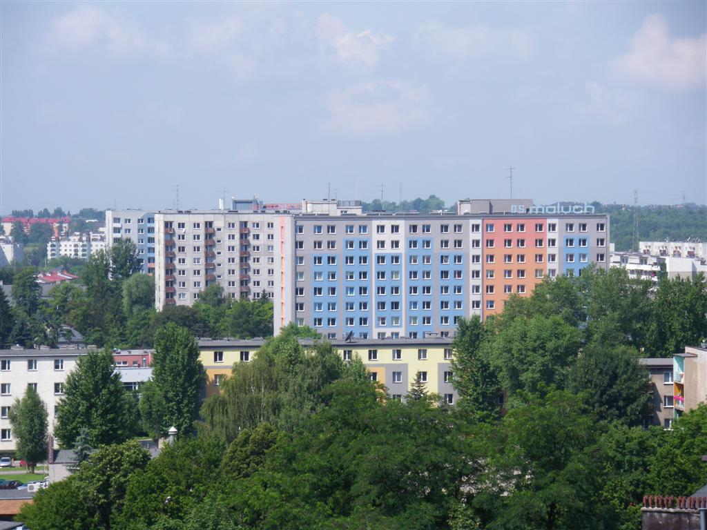 Domy Studenckie Politechniki Częstochowskiej